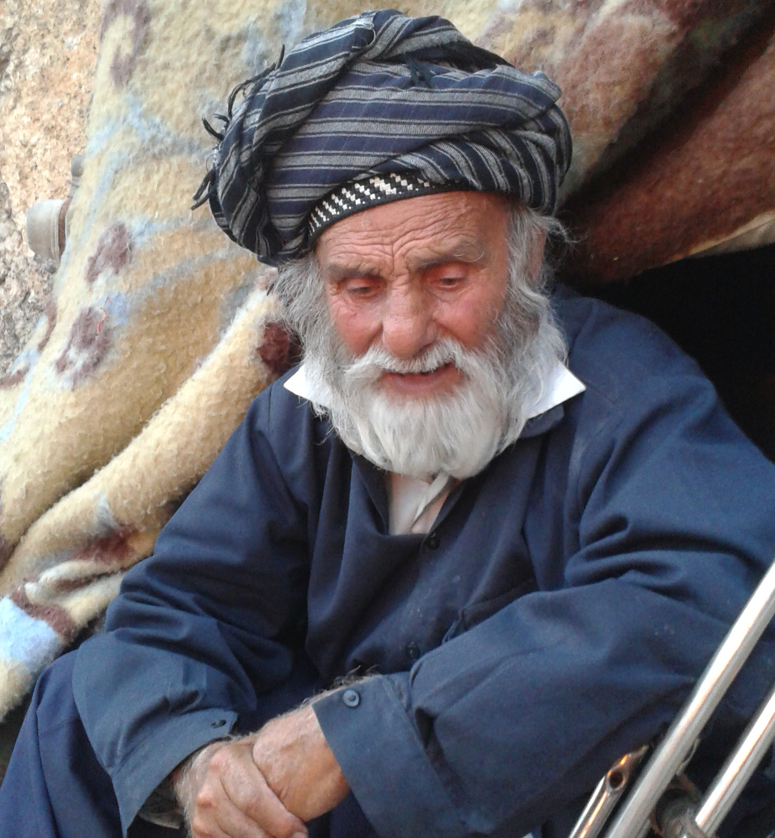 نگاره‌ای از خالو حسین کوهکن، سازنده غاز دست‌ساز در میگوره ار توابع شهر بانه‌وره